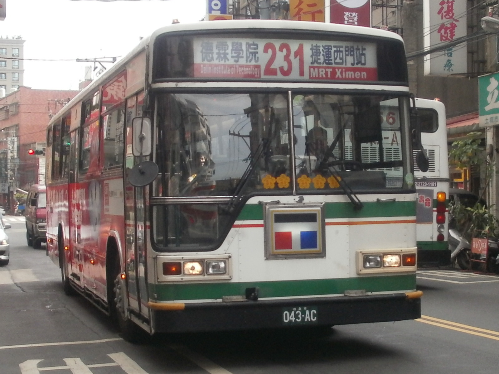 台北客運2003年日野ERK2JRL大客車043-AC，行駛台北市聯營公車231線。